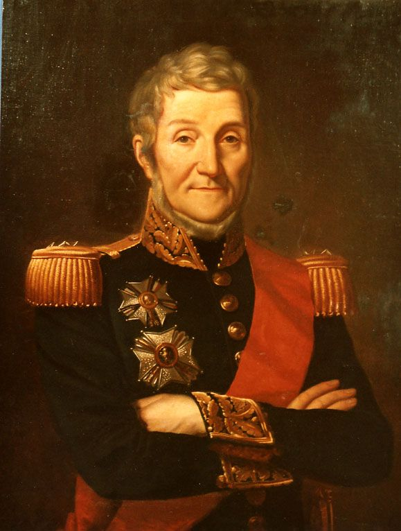 Louis-Joseph Lahure (1767-1853), Lieut. Général, Baron de l'Empire